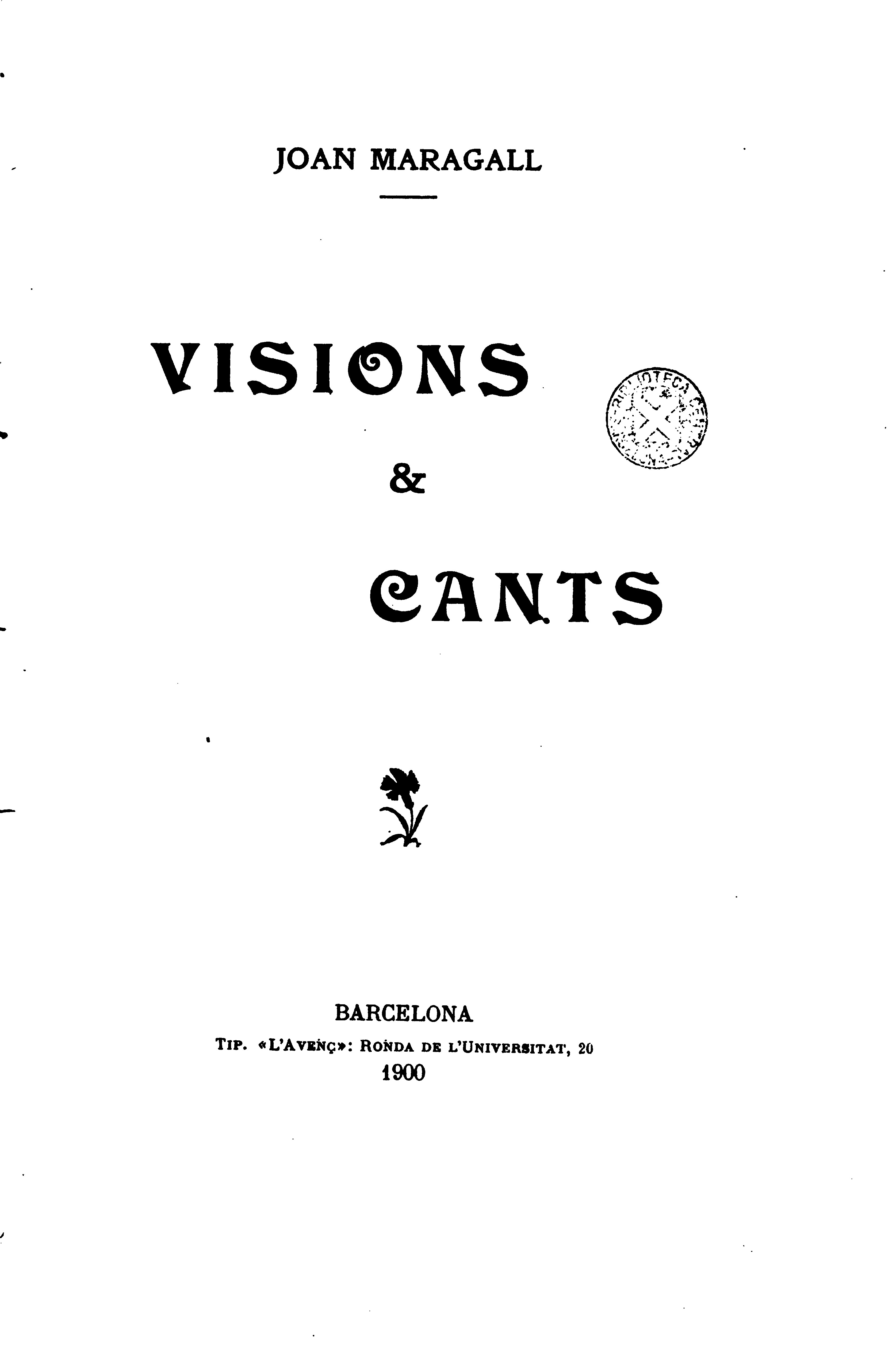 MARAGALL, Joan: Visions & Cants, Tip. L'Avenç, Barcelona, 1900. Inclou: VISIONS: El mal caçador, Joan Garí, El comte Arnau, L' estimada de Don Jaume, La fi den Serrallonga. INTERMEZZO: A la Mare de Déu de Montserrat, La cançó de Sant Ramón, En la mort d'un jove, Els Reis, Sol solet, Dimecres de Cendra, Lo Divi en el Dijous Sant, L'aufabrega, A montanya, Després de la tempestat, La nit de la Purissima, L'ànima de les flors, La Dóna hermosa, L' esposa parla. CANTS: La sardana, El cant de la Senyera, Cant dels joves, Cant de Maig, cant d' alegría, Cant de Novembre, Els tres cants de la guerra (Els adéus, Oda a Espanya, Cant del retom).